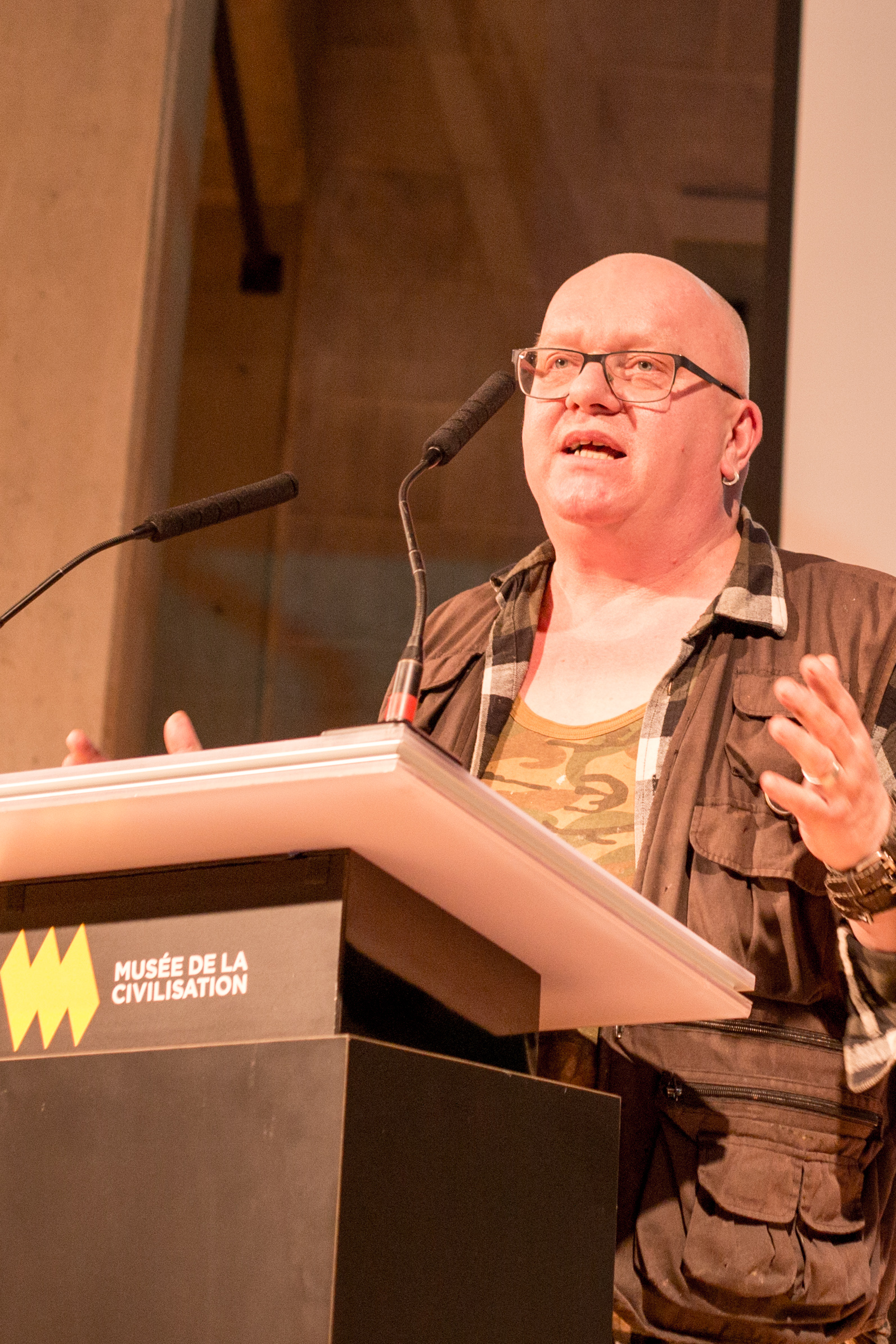 Henriette Valium (Patrick Henley) lors de la remise des Prix Bédéis causa 2018 à Québec.